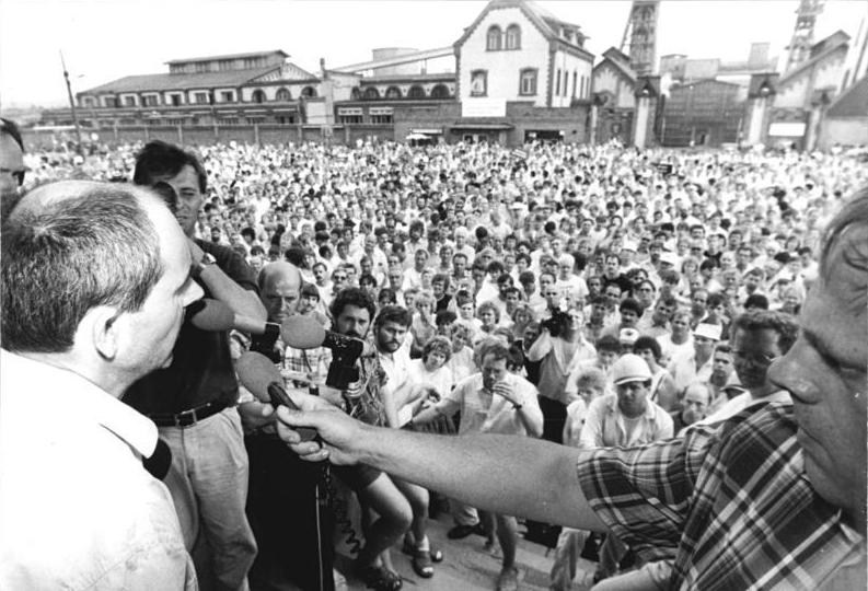 ADN- Ralf Hirschberger 5.8.90 Bleicherode: Kundgebung der Kali-Kumpel- Die Bergleute erzwangen mit ihren Aktionen, daß Vertreter von Ministerien per Hubschrauber eingeflogen wurden, um Rede und Antwort zu stehen. Hier Alwin Ziel, Staatssekretär im Ministerium für Arbeit und Löhne.